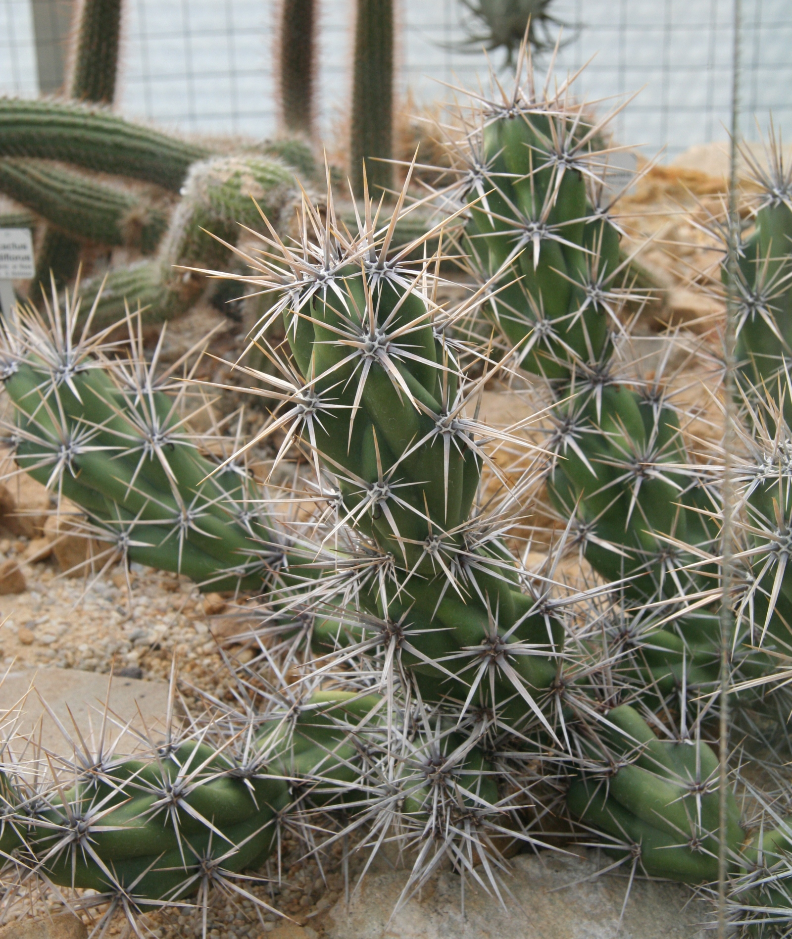 Opuntia invicta im Botanischen Garten Dresden